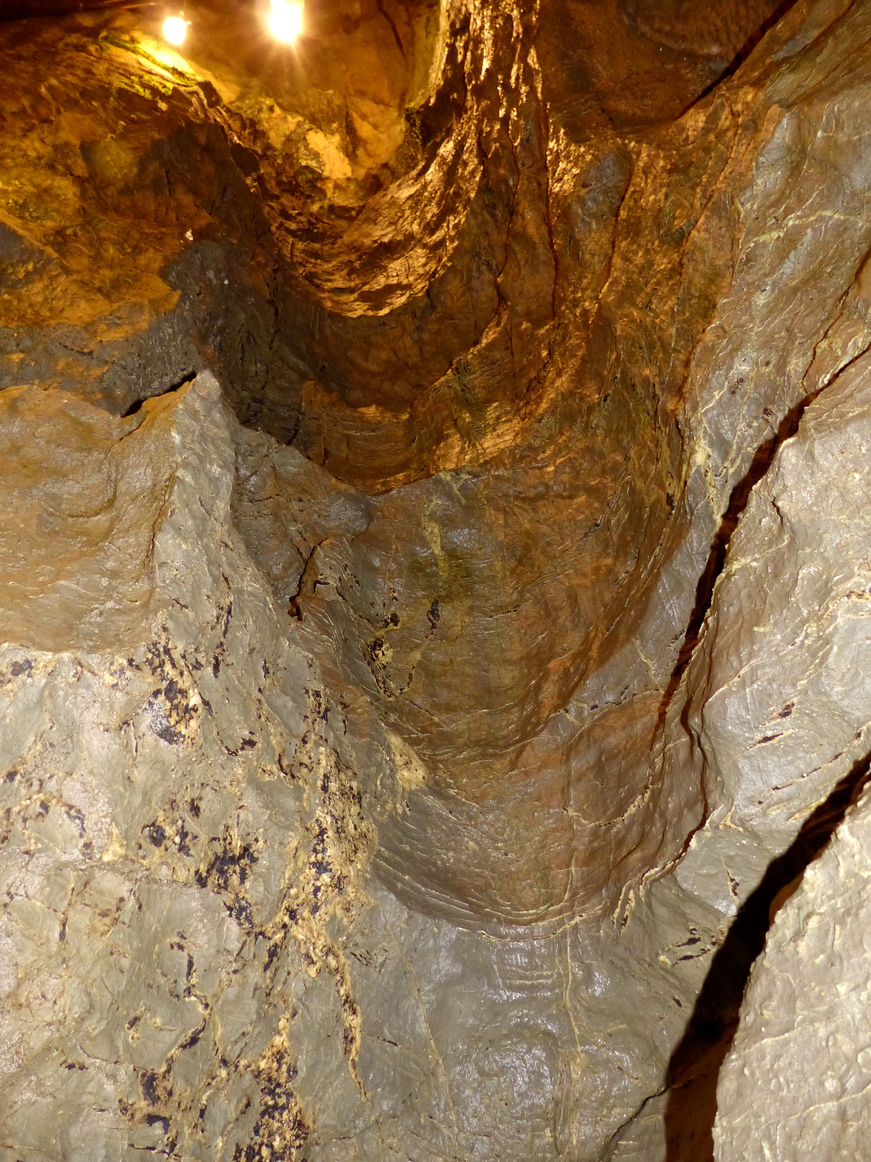 WikiProjekt Landstreicher: Sturmannshöhle - Gletschermühle